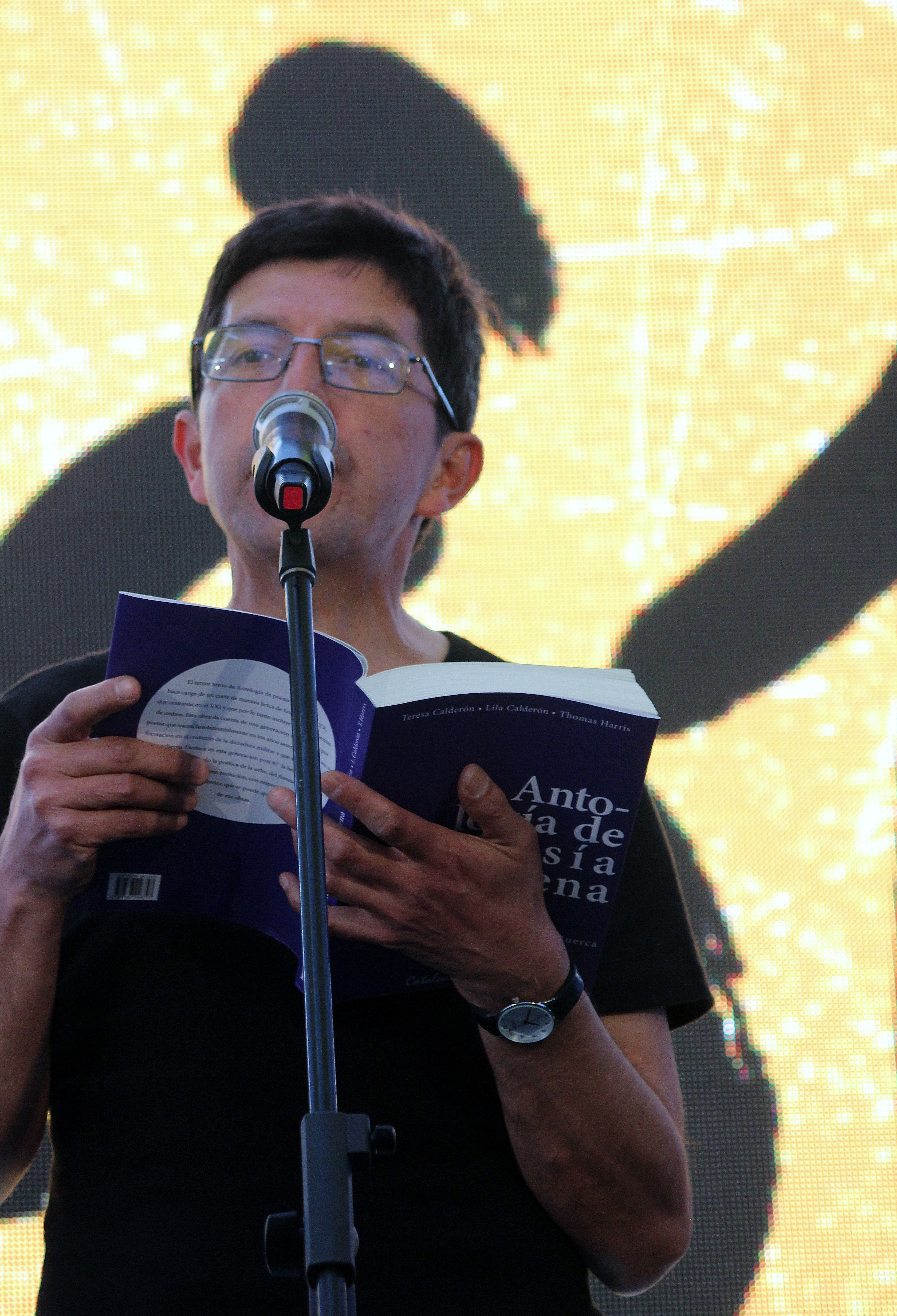 El poeta chileno Francisco Véjar durante la presentación de la Antología de poesía chilena / Volumen III. La generación post 87: otra vuelta de tuerca (compiladores: Teresa Calderón, Lila Calderón, Thomas Harris) en la segunda etapa del Festival de Autores de Santiago 2018 realizada en el GAM.